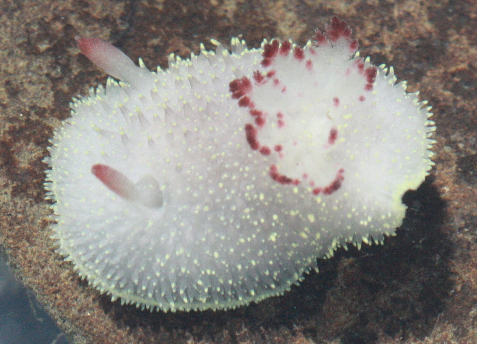 Acanthodoris nanaimoensis, Pillar Point, California, Estados Unidos